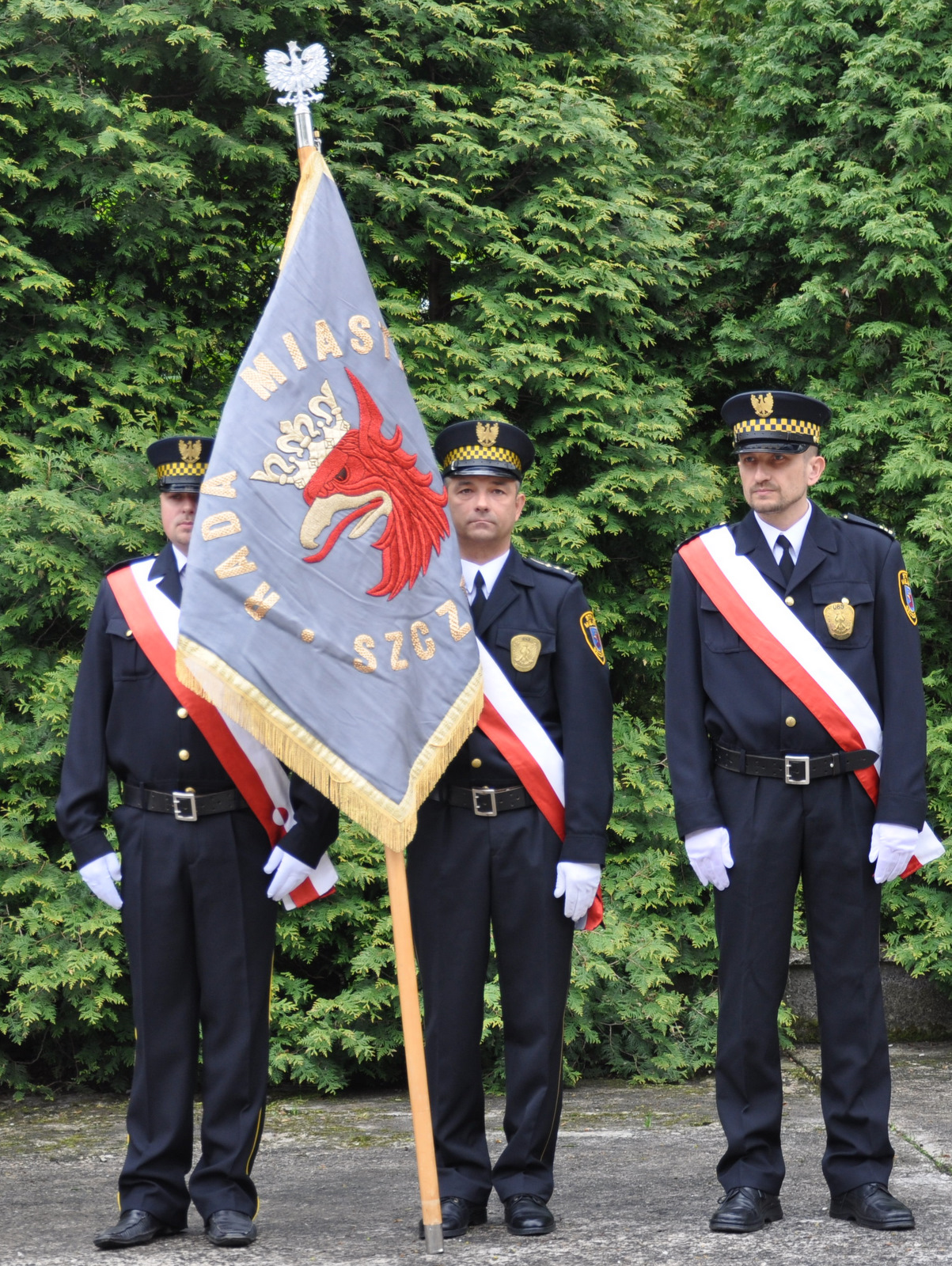 Sztandar Rady Miasta Szczecina